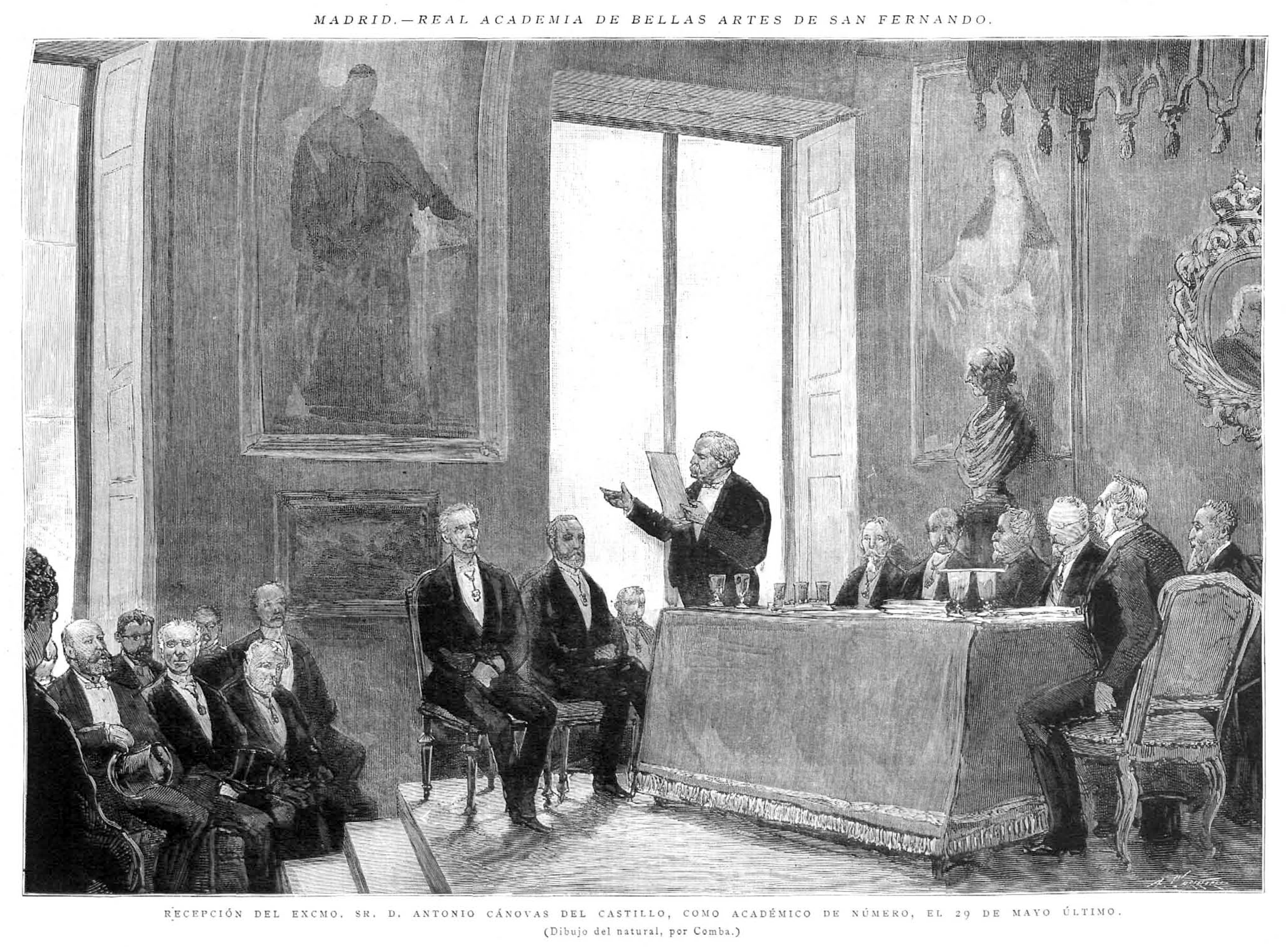 Madrid. Real Academia de Bellas Artes de San Fernando. Recepción de Antonio Cánovas del Castillo como académico de número, el 29 de mayo último.